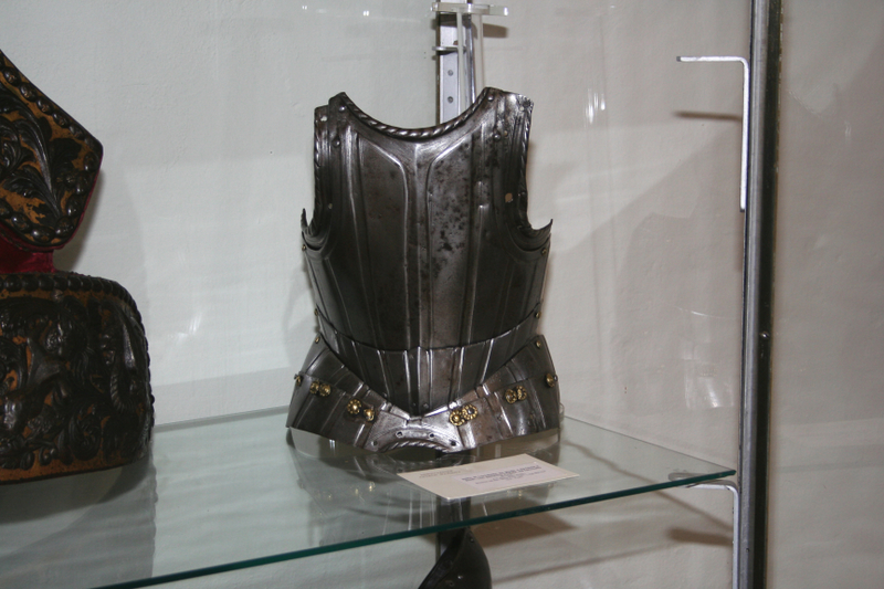 Armatura da parata per bambino, XVI sec., Palazzo Duranti-Marzoli, Palazzolo sull'Oglio.